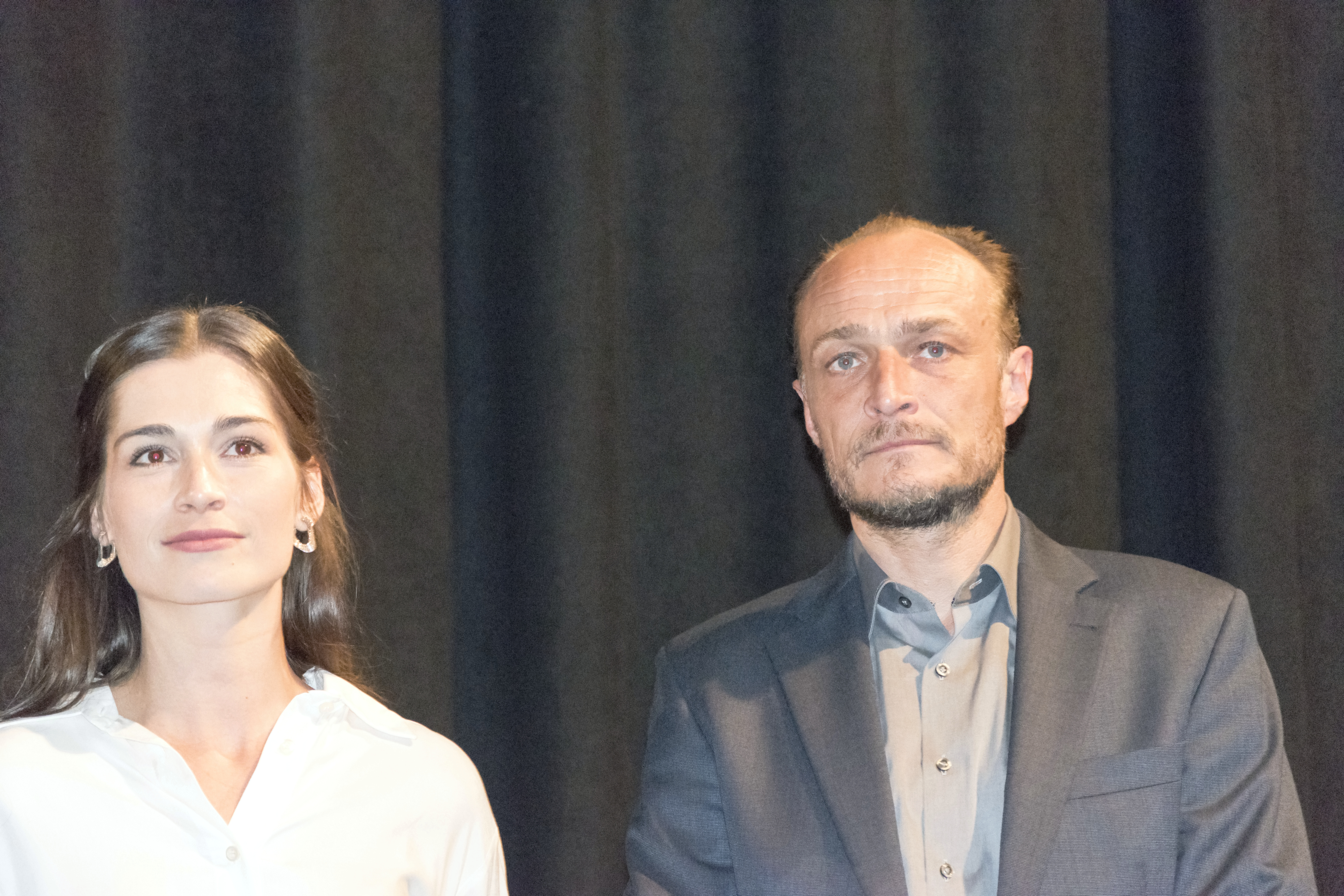 Fotky z novinářské projekce 18. 4. 2018 Autor: Blanka Borová (Karolína Černá) pro Kritiky.cz